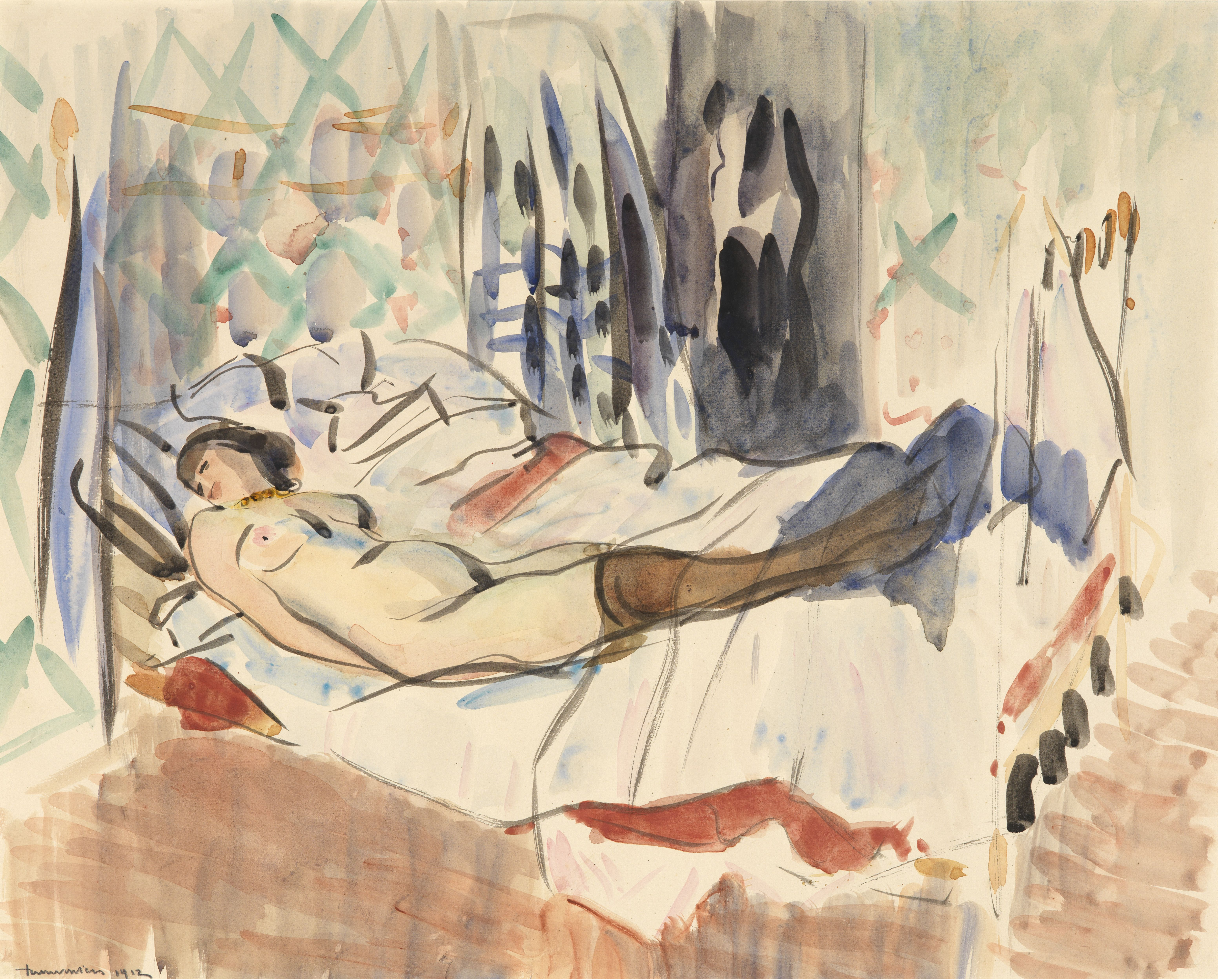 Aquarel ( Rik Wouters( koninklijk museum voor schone kunsten antwerpen